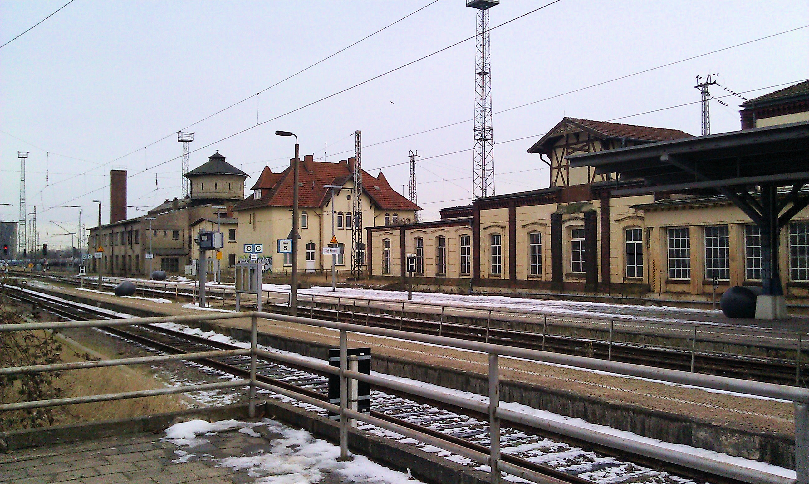 Bahnhof Bad Kleinen, Mecklenburg-Vorpommern